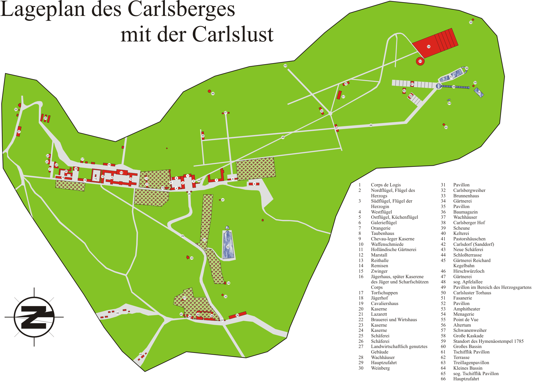 Lageplan von Schloss Karlsberg Das Bild wurde von mir gezeichnet, die Webseite gehört auch mir. Vor einer weiteren Löschung bitte ich um Rücksprache.